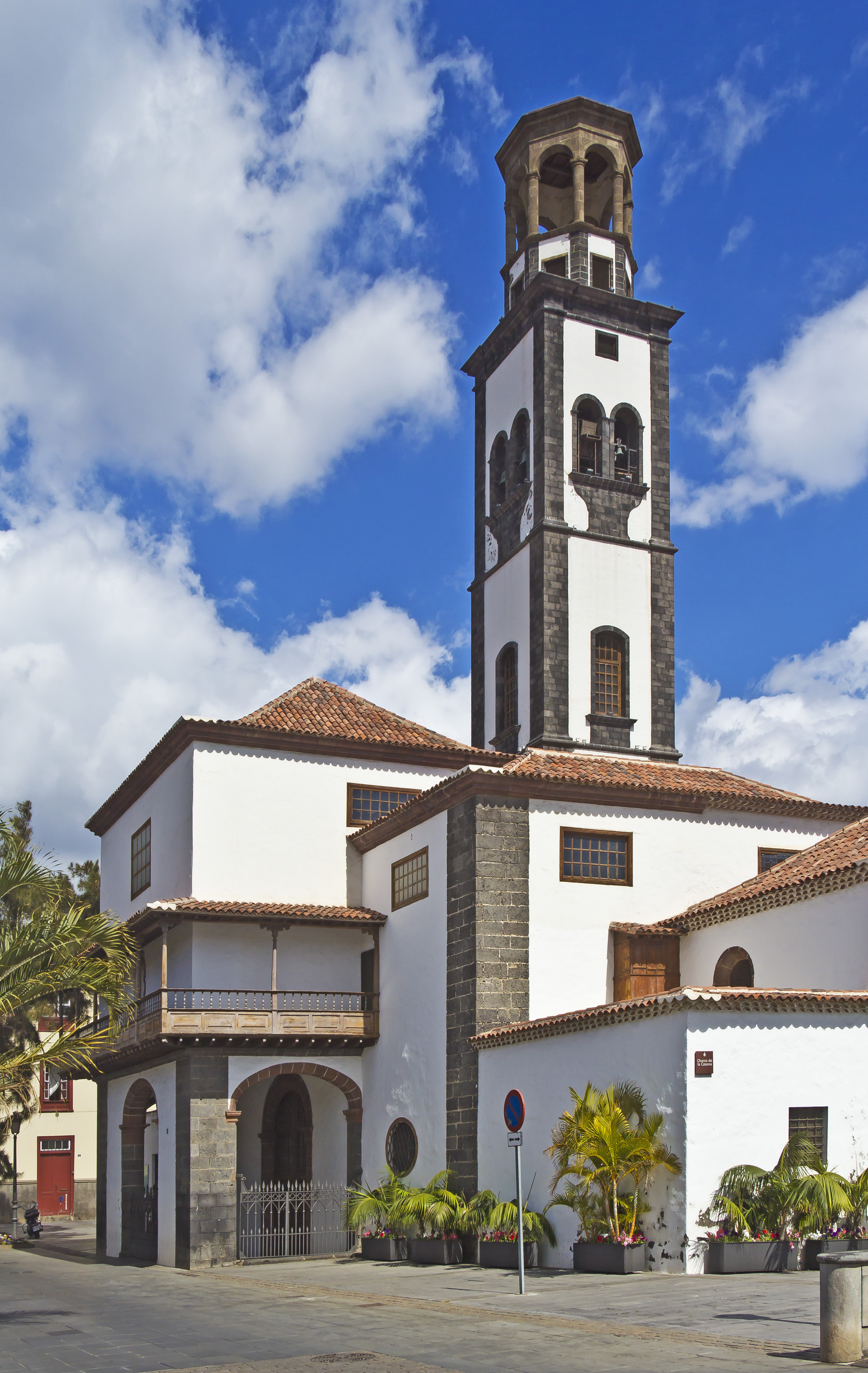 Kirche Nuestra Señora de la Concepción in Santa Cruz de Tenerife